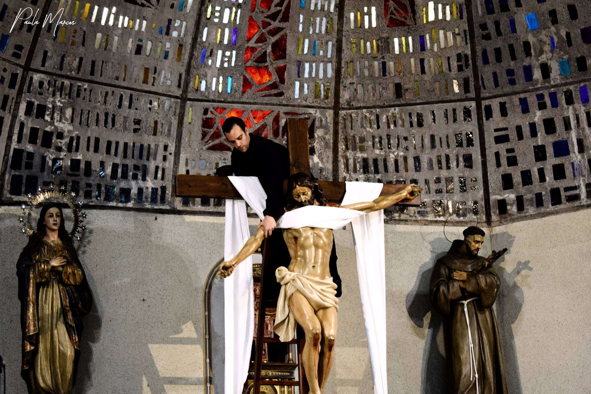 Desenclavo